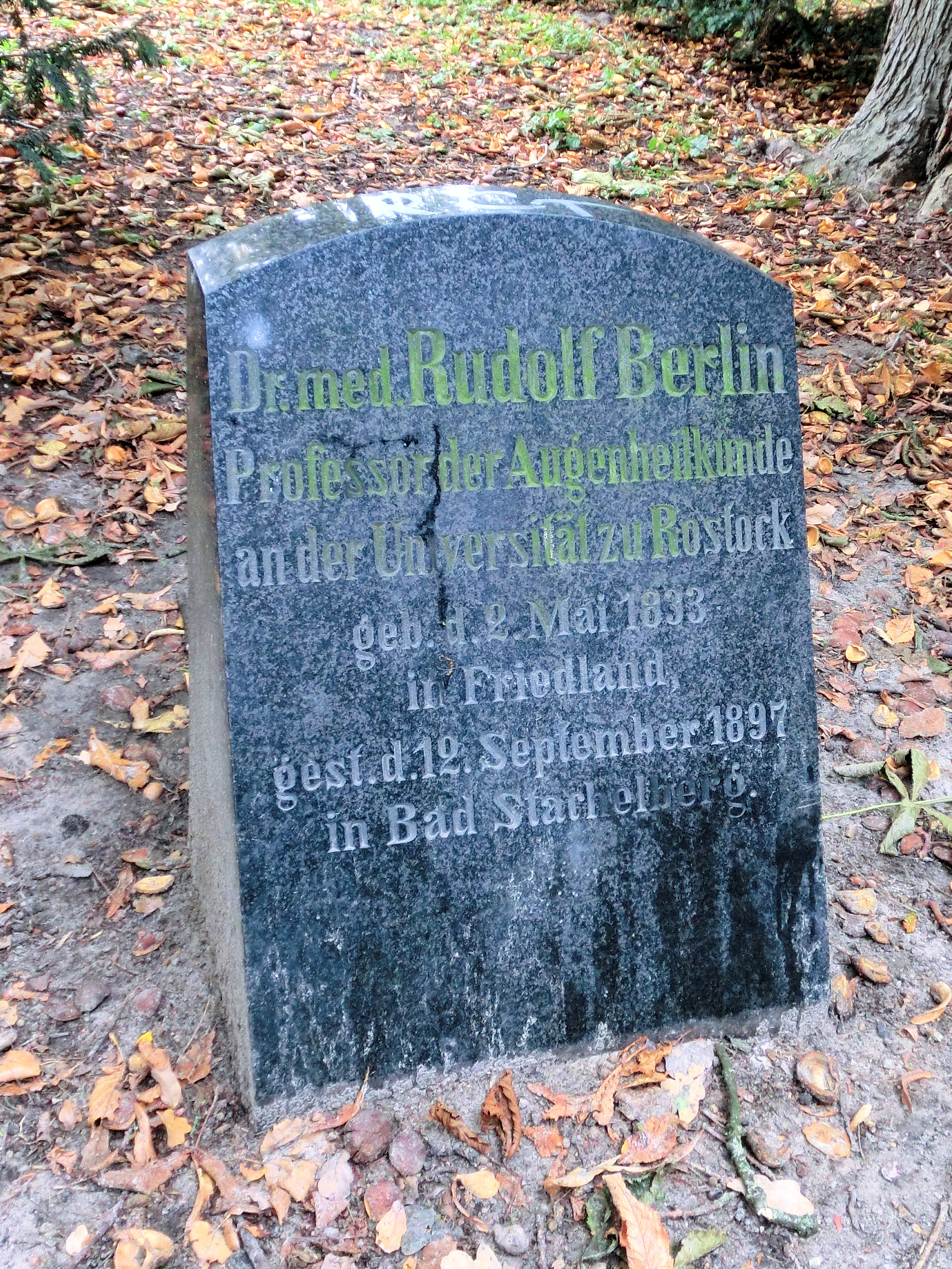 Lindenpark Rostock (ehemaliger Alter Friedhof), Grabstein Rudolf Berlin